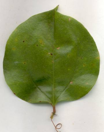 Smilax rotundifolia